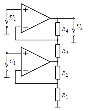 Subtrahierer mit hohe Eingangswiderständen